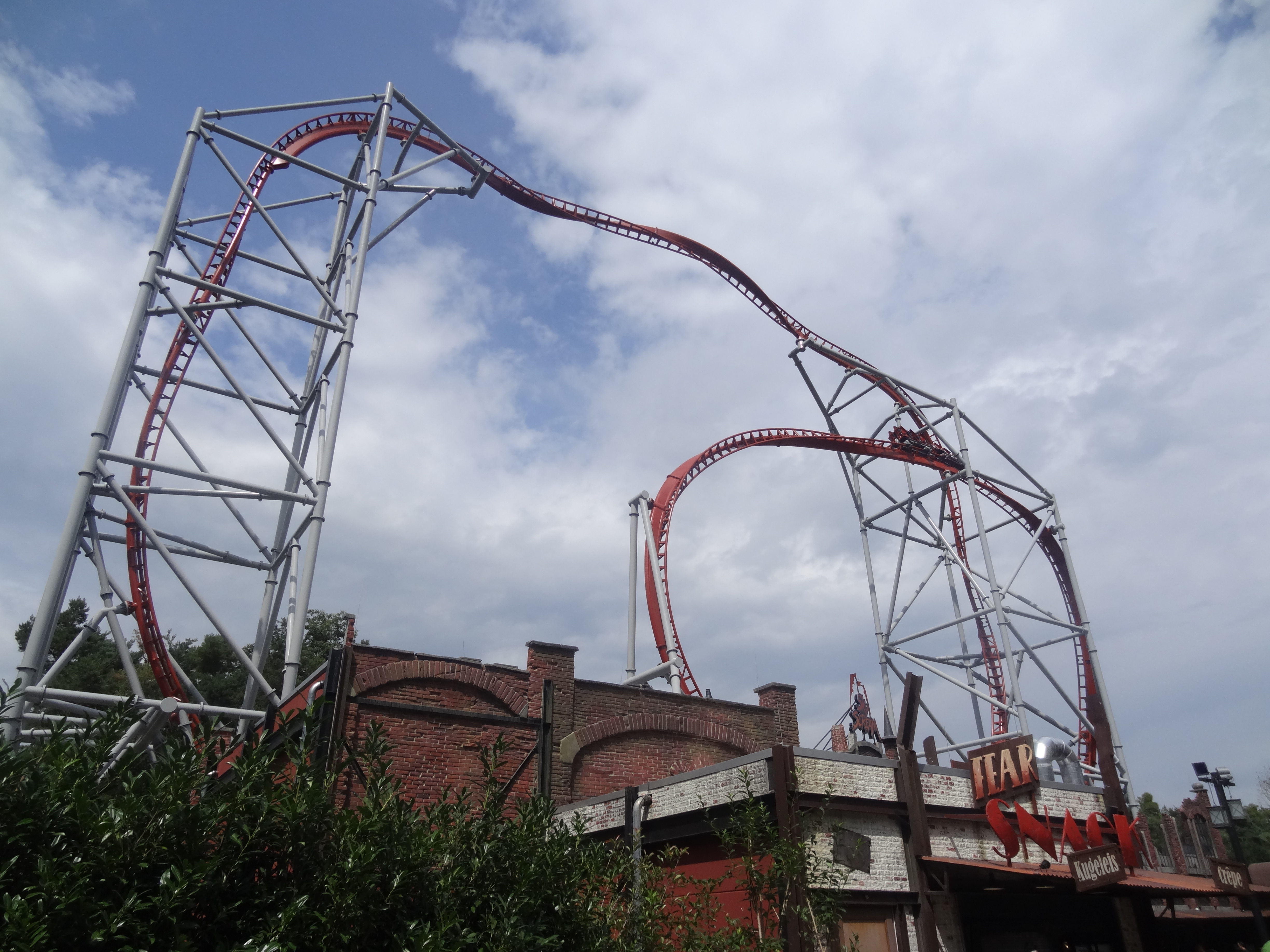 Sky Scream à Holiday Park